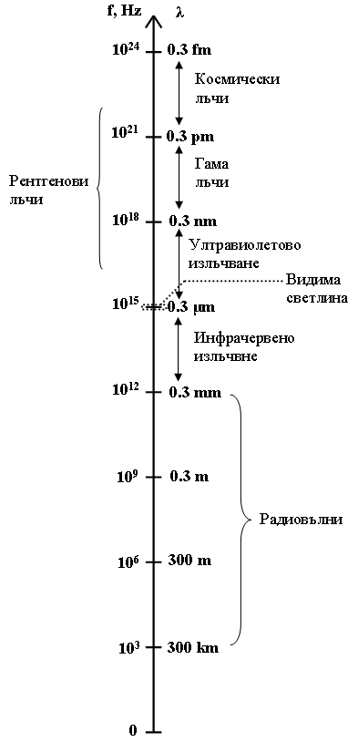 Електромагнитен спектър; © 2007 Милко Куйлеков